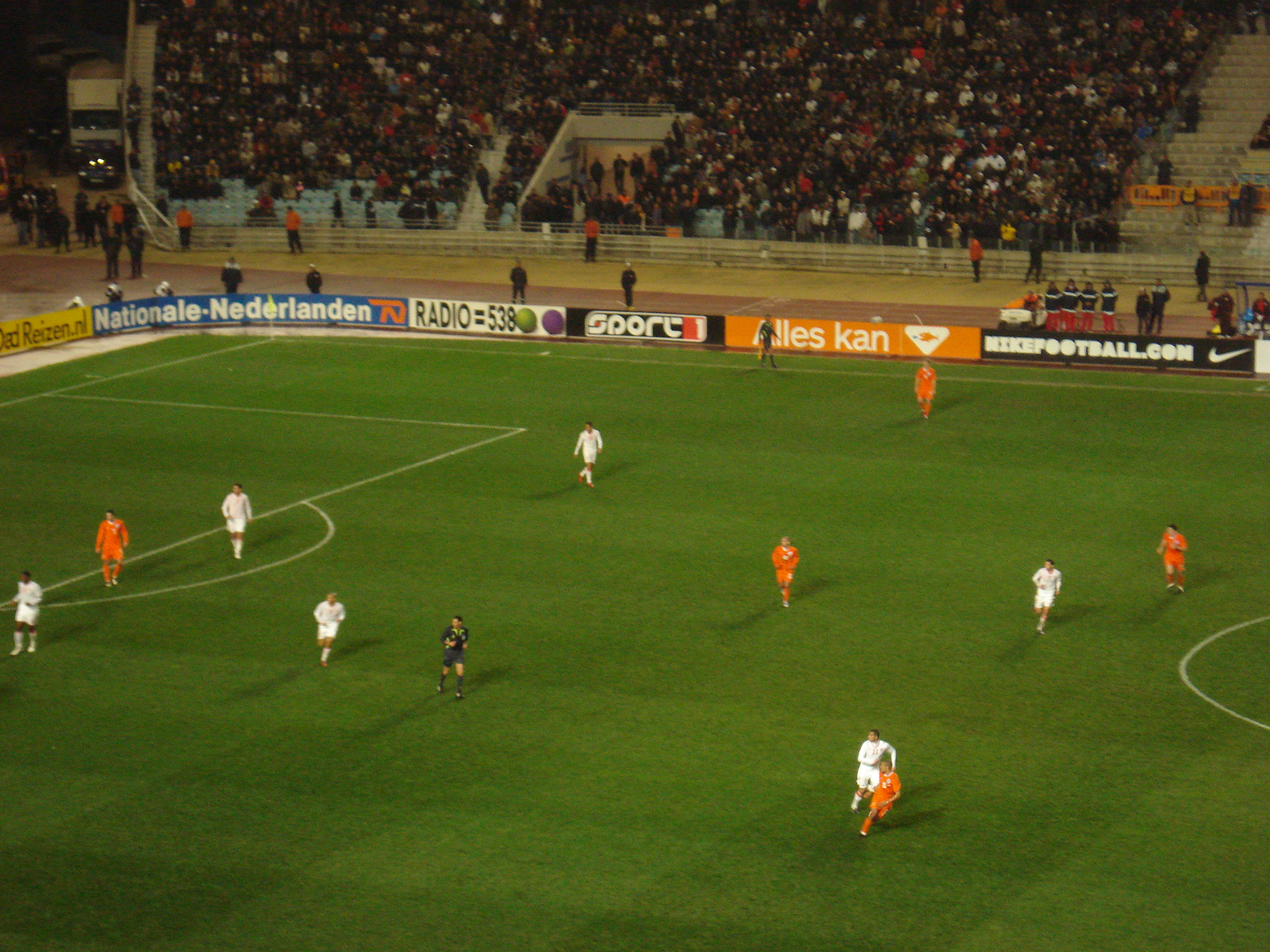 Tunisie - Pays-Bas (1-1), Stade de Radès, Tunis, Tunisie